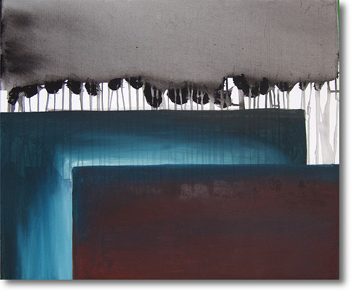 Foto des Gemäldes "Zweisamkeit der Quadrate bei Regenwetter"